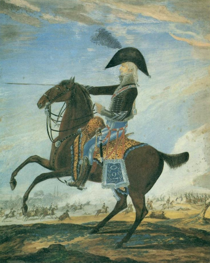 Charles Étienne de Ghigny (1771-1844), colonel français et lieutenant-général des Pays-Bas. Il est ici représenté comme chef d'escadron du 2e hussards en 1803.